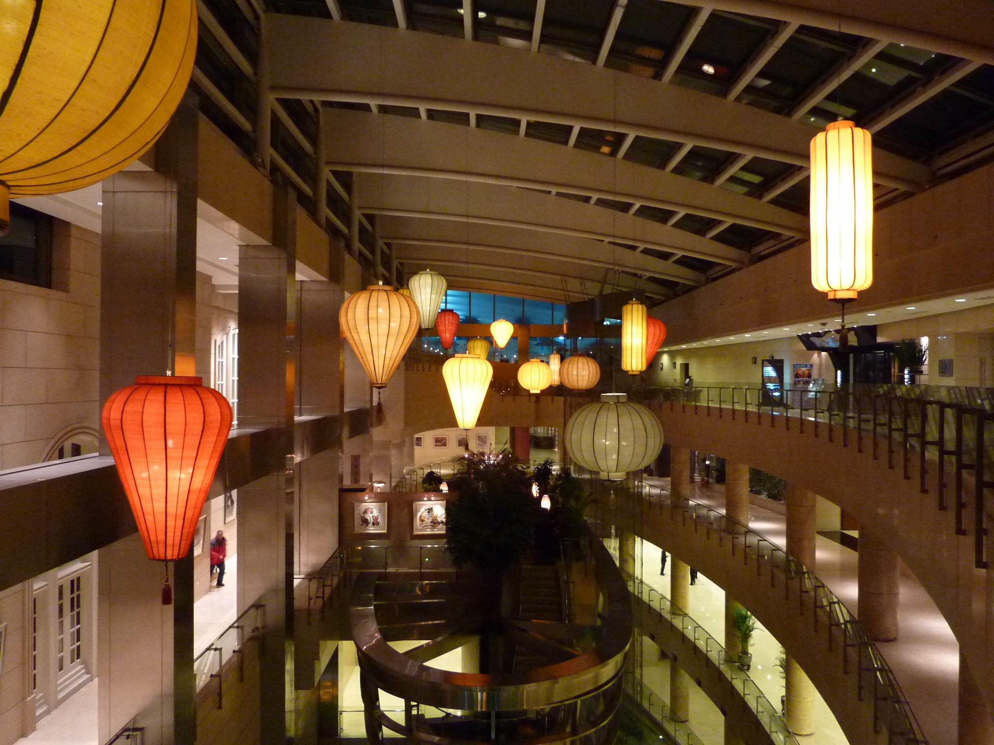 ·˙·ChinaUli2010·.· Beijing - by night